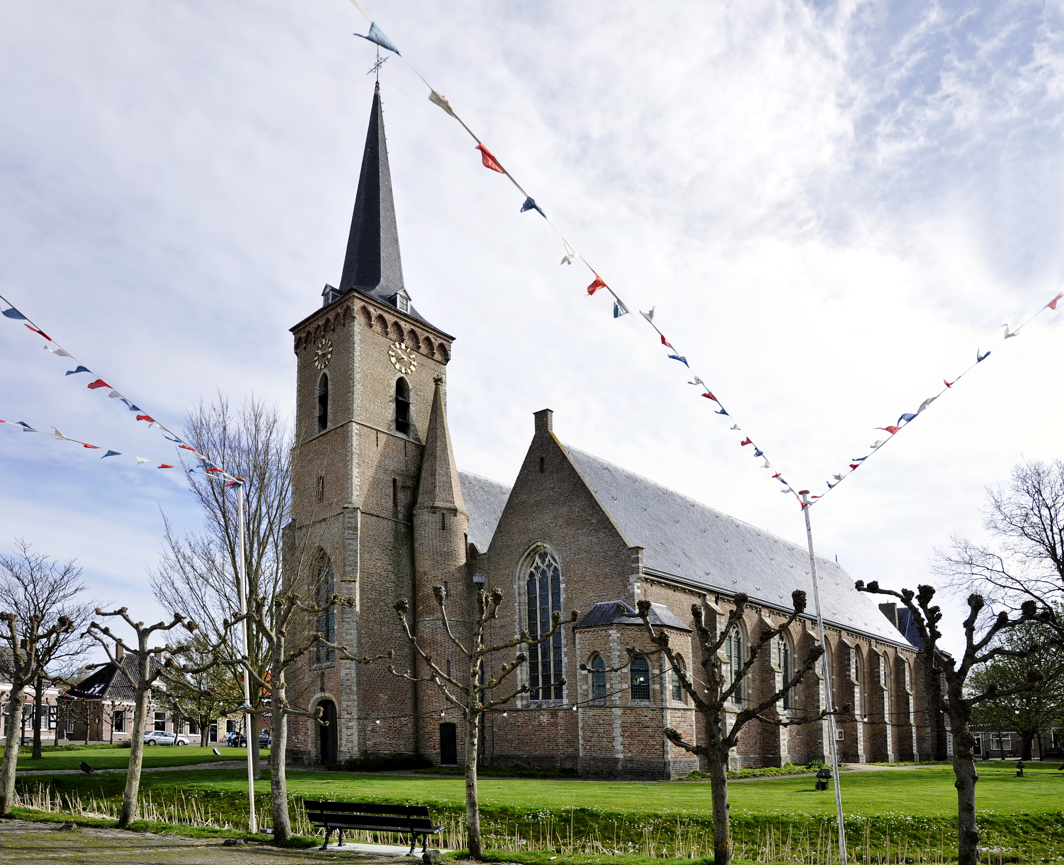 Zicht op een deel van de Sint-Adriaanskerk te Dreischor, Nederland